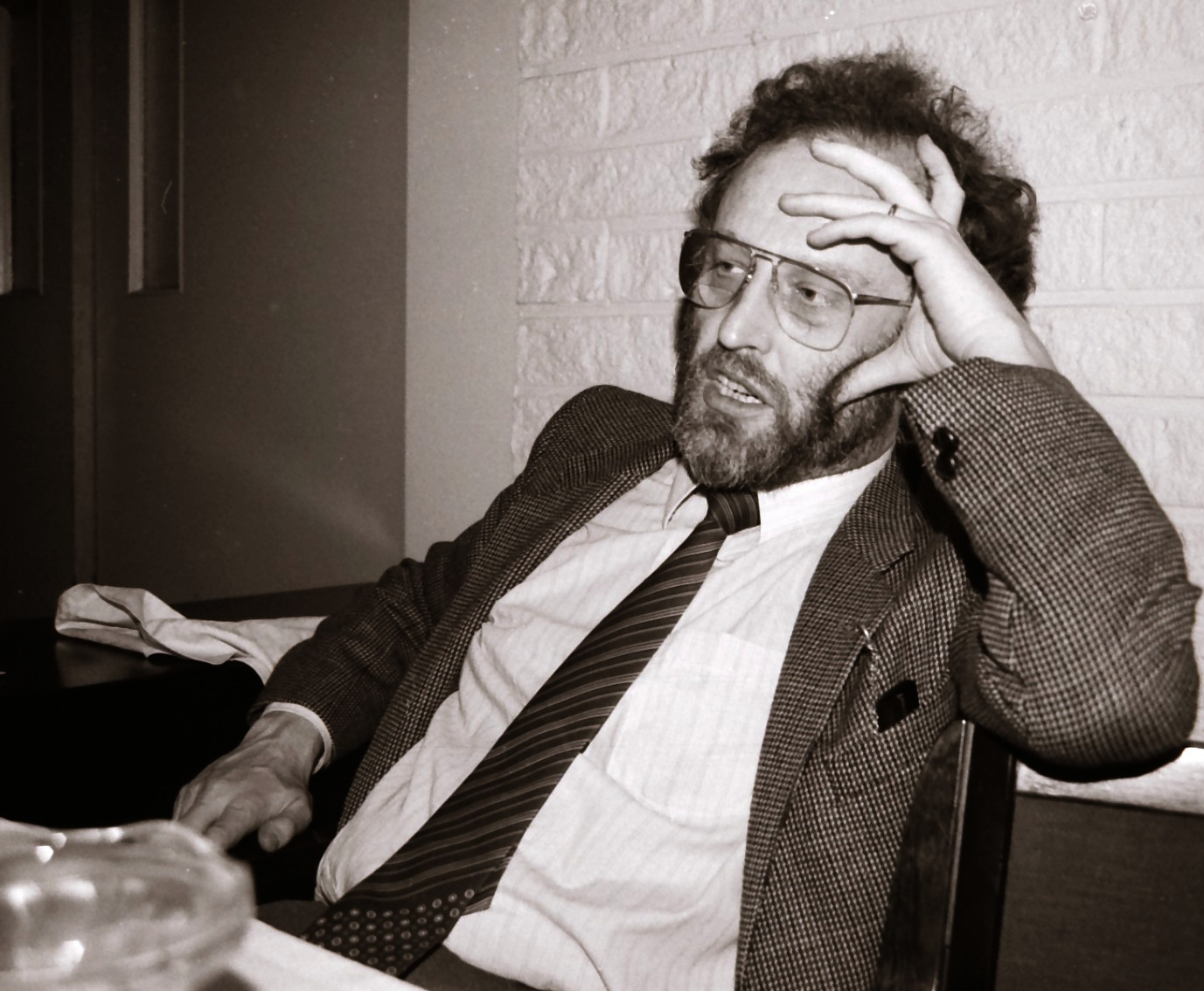 Seppo Heikinheimo Kuusankoskitalon konserttisalin vihkiäiskonsertin jälkeen 1985